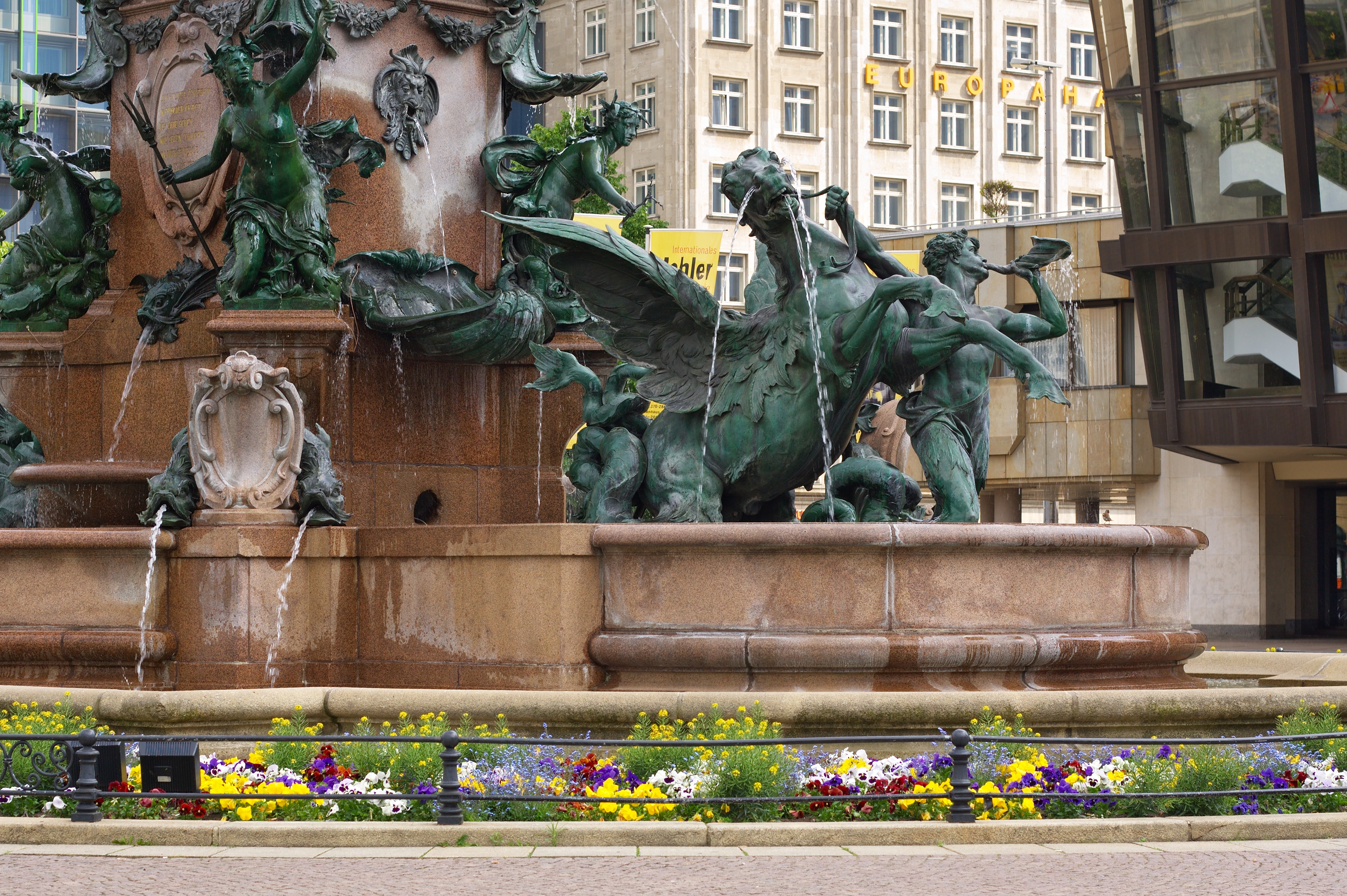 Detail Mendebrunnen in Leipzig, 2011